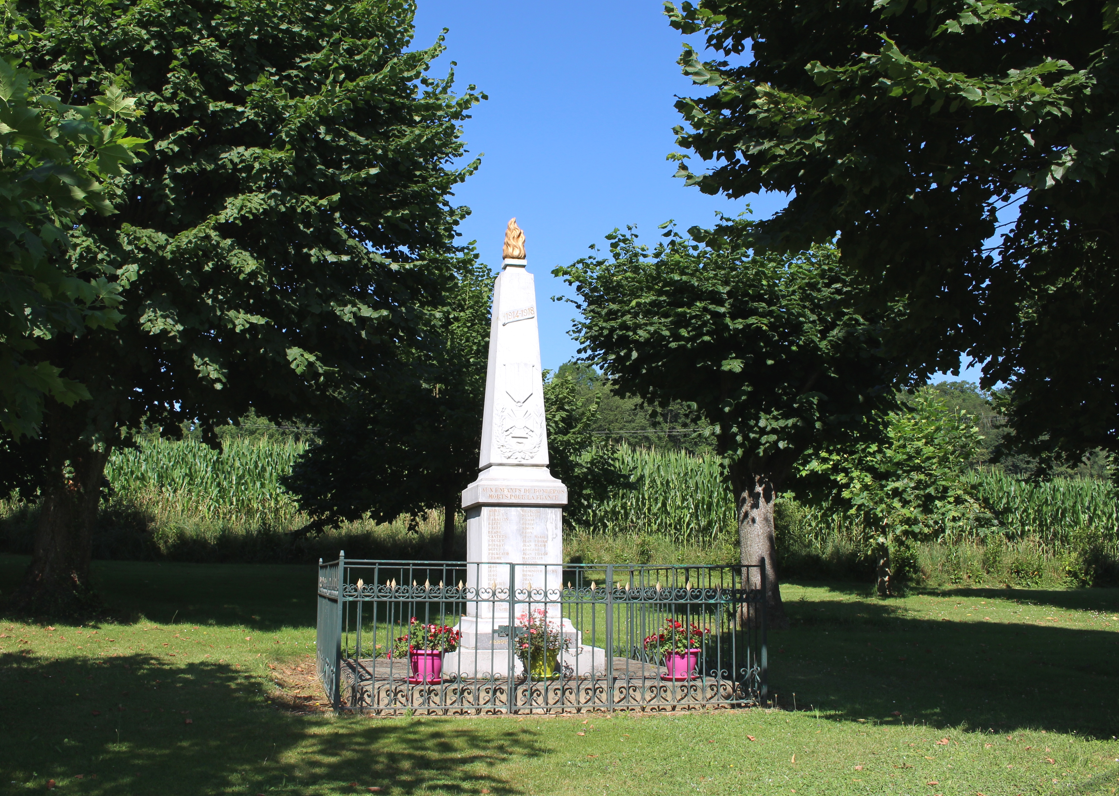 Monument aux morts de Bonrepos (Hautes-Pyrénées)